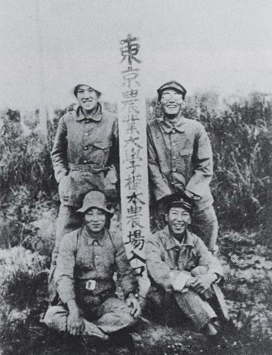 夏期樺太演習